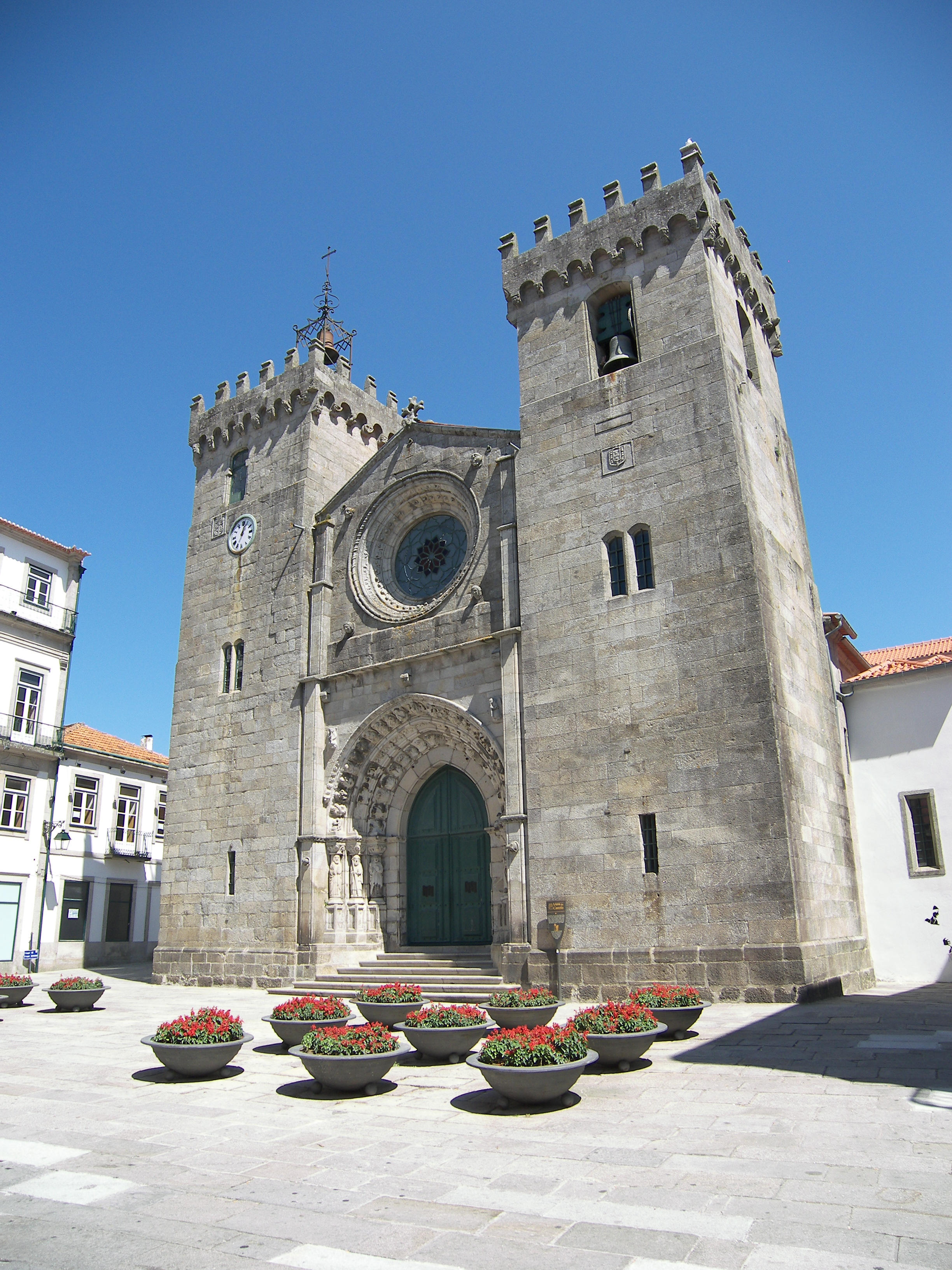 Igreja Matriz in Viana do Castelo